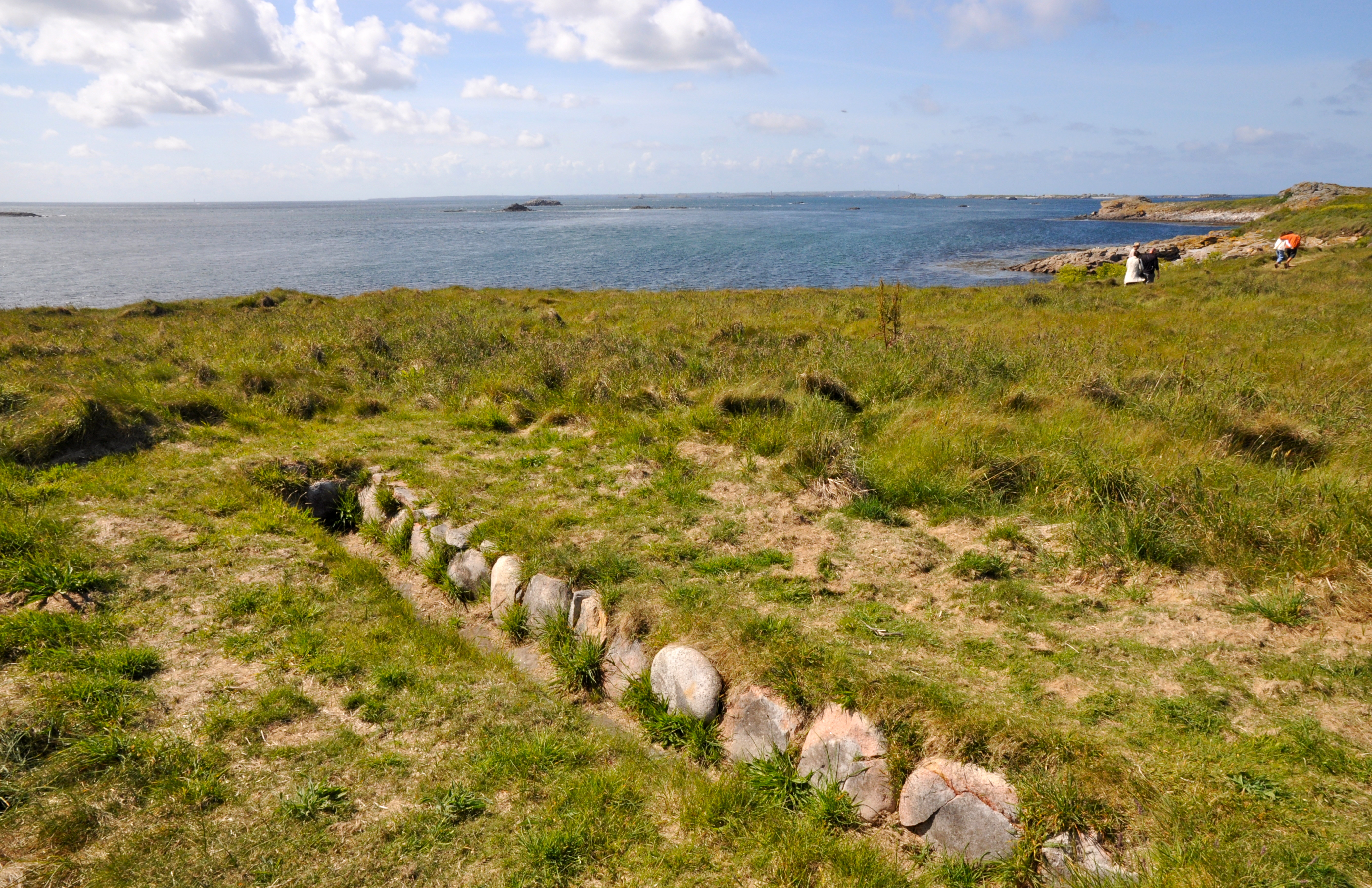 Ancien four à soude sur l'ILE MOLENE.